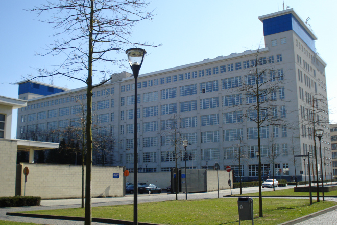 Philips